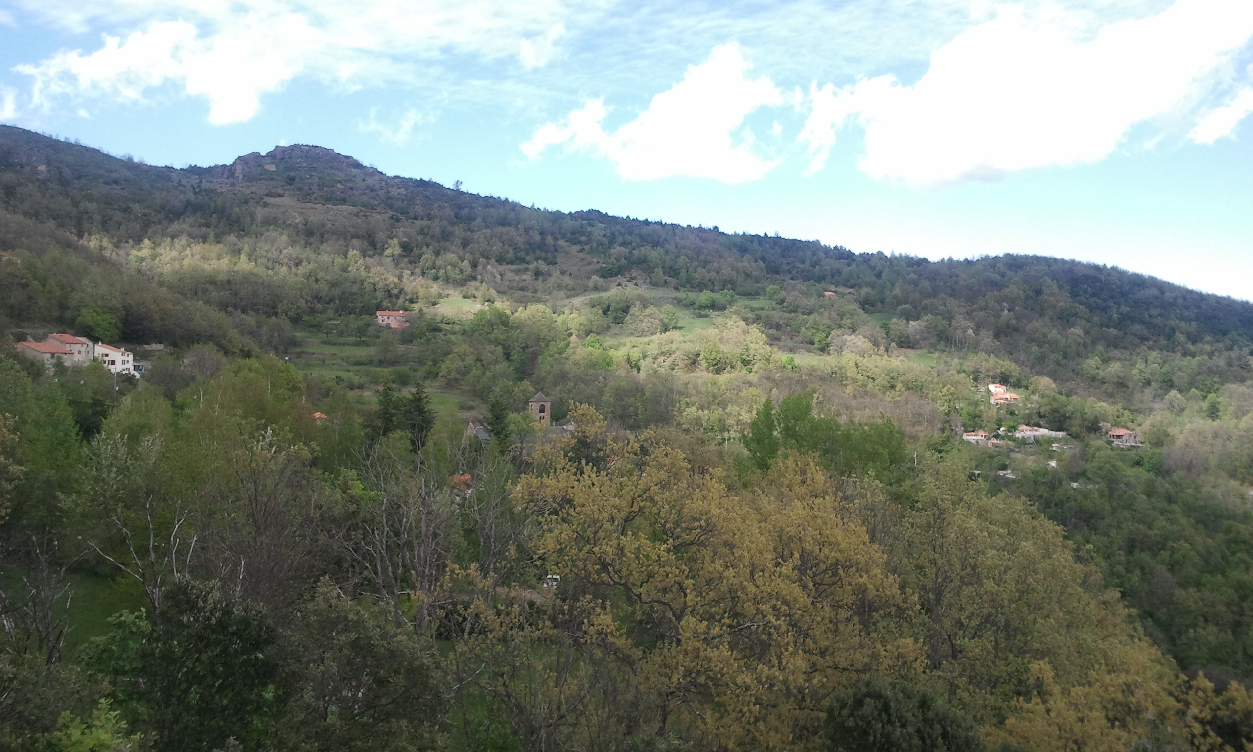 Vue générale de Montferrer